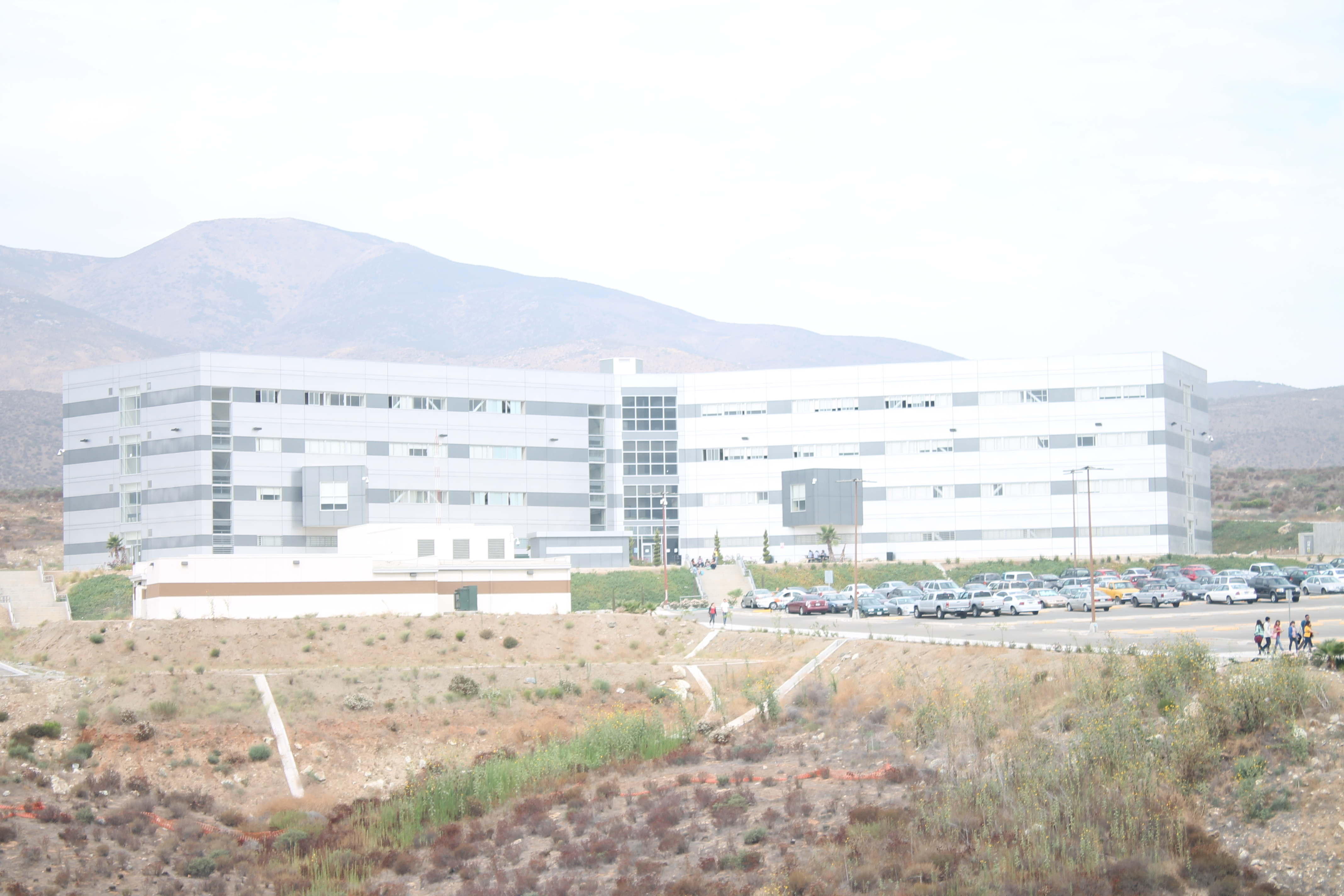 Edificio sede del Centro de Ciencias de la Salud en Valle San Pedro, Tijuana